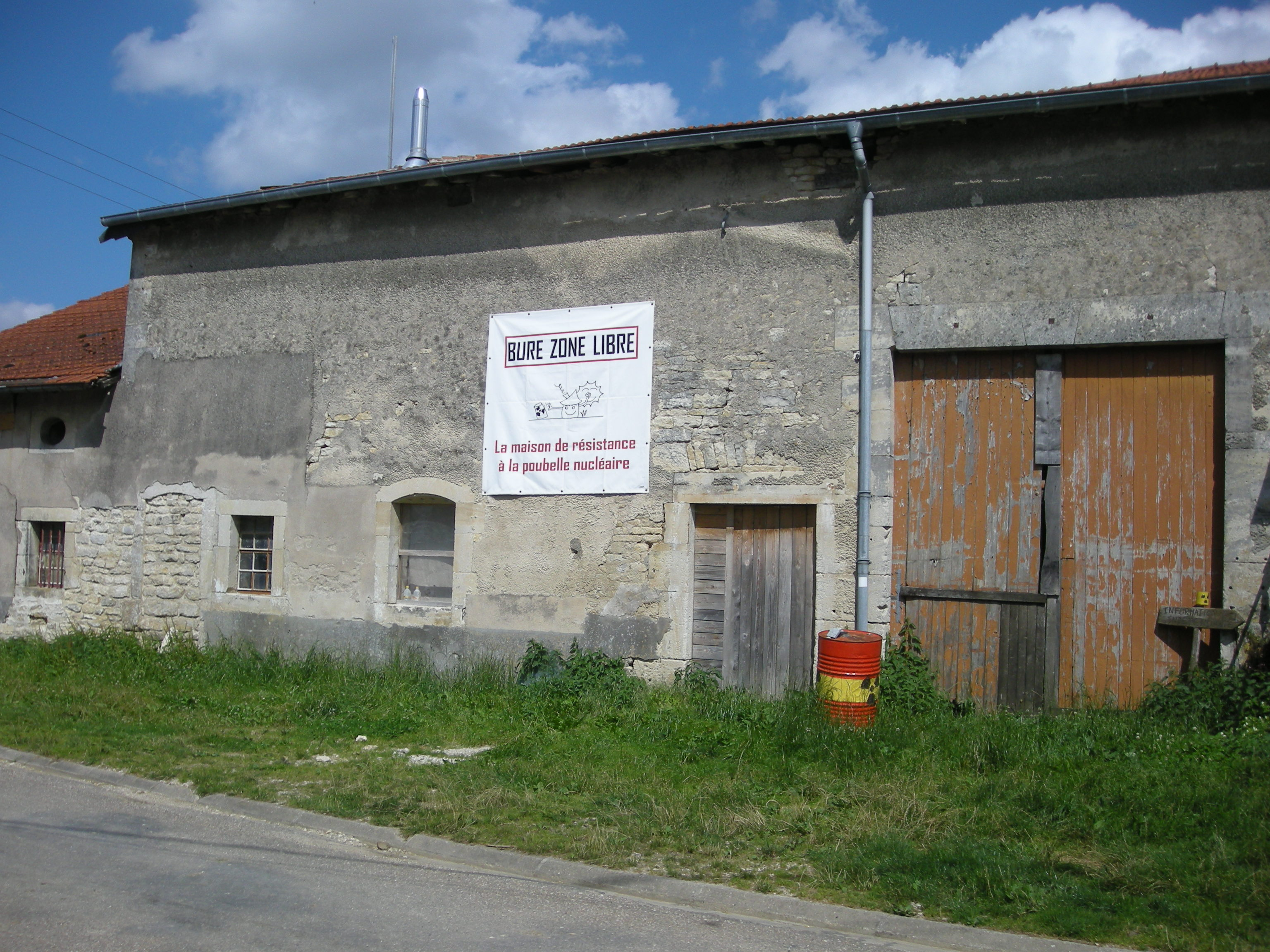 Maison de résistance contre l'enfouissement des déchets radioactifs à Bure (Meuse)